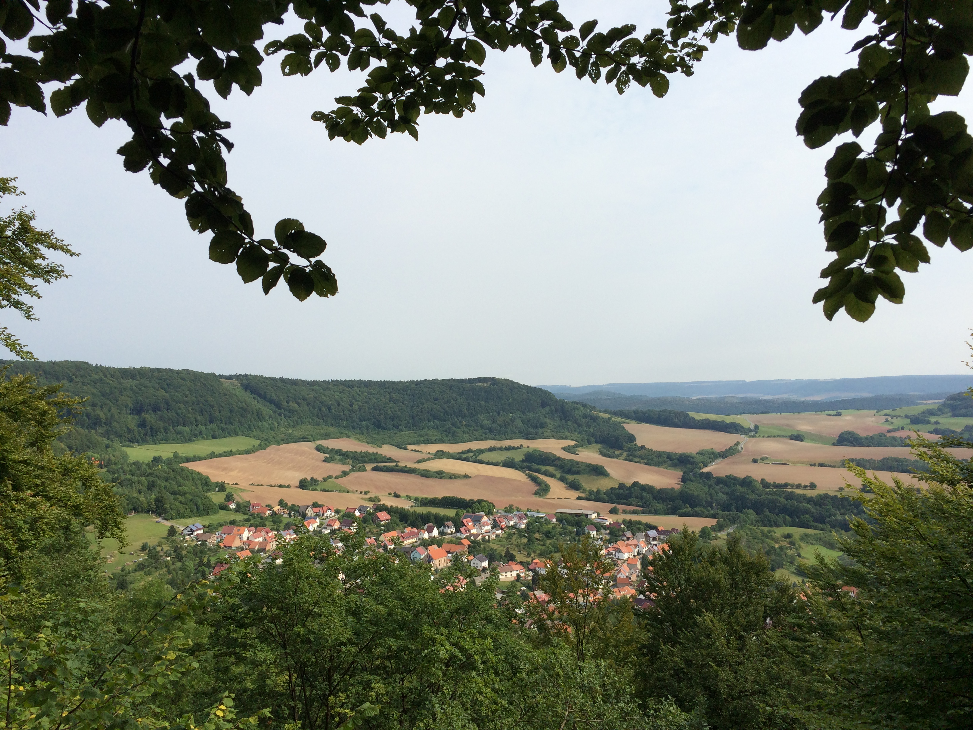 Aussichtspunkt Kella am Werra-Burgen-Steig Hessen (X5H) mit Blick auf Kella und Pfaffschwender Kuppe (494 m), links daneben an der Waldschneise das sogenannte Grenzeck an der ehemaligen Innerdeutschen Grenze